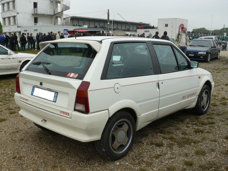 Français cadien: Montlhrey Avril 2012